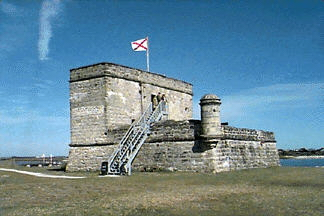 Fort Matanzas, Florida